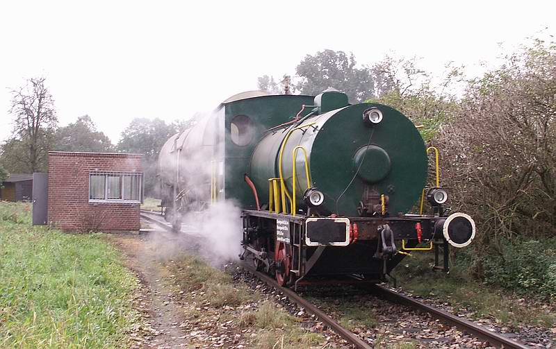 photographed by me Das ist eine Dampfspeicherlok, welche mit Heißdampf fährt. Sie benötigt keine Kohle oder Öl zum Heizen.